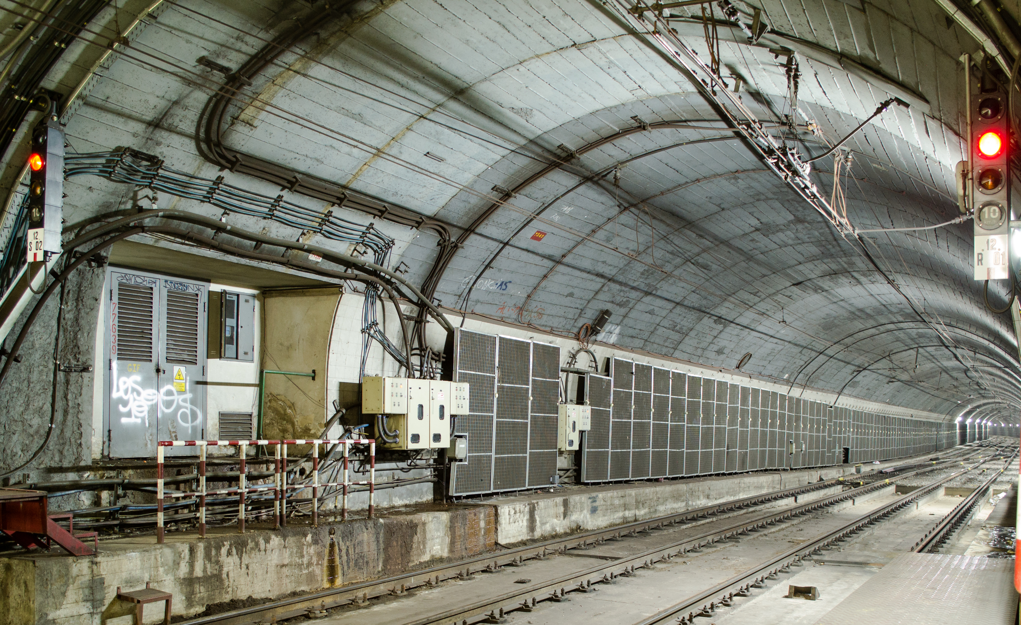 Ubicación del apeadero provisorio Carranza que funcionó entre 1987 y 1993.